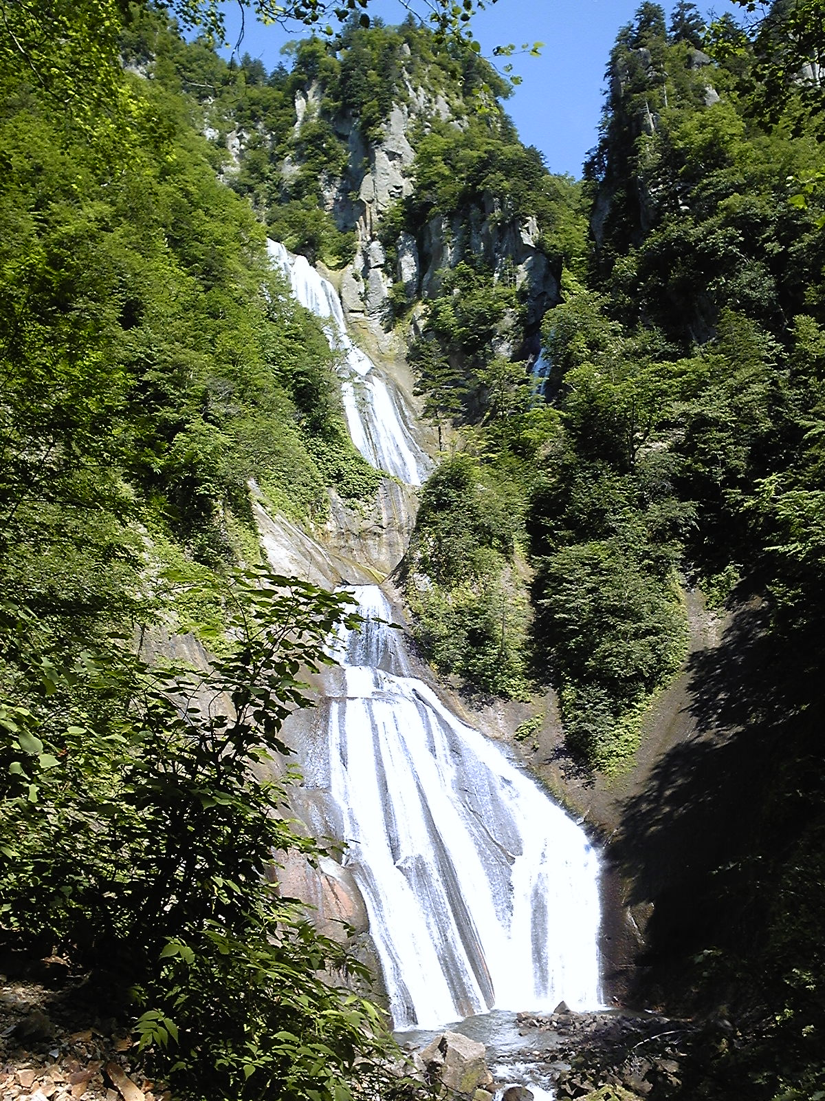 羽衣の滝（北海道東川町）